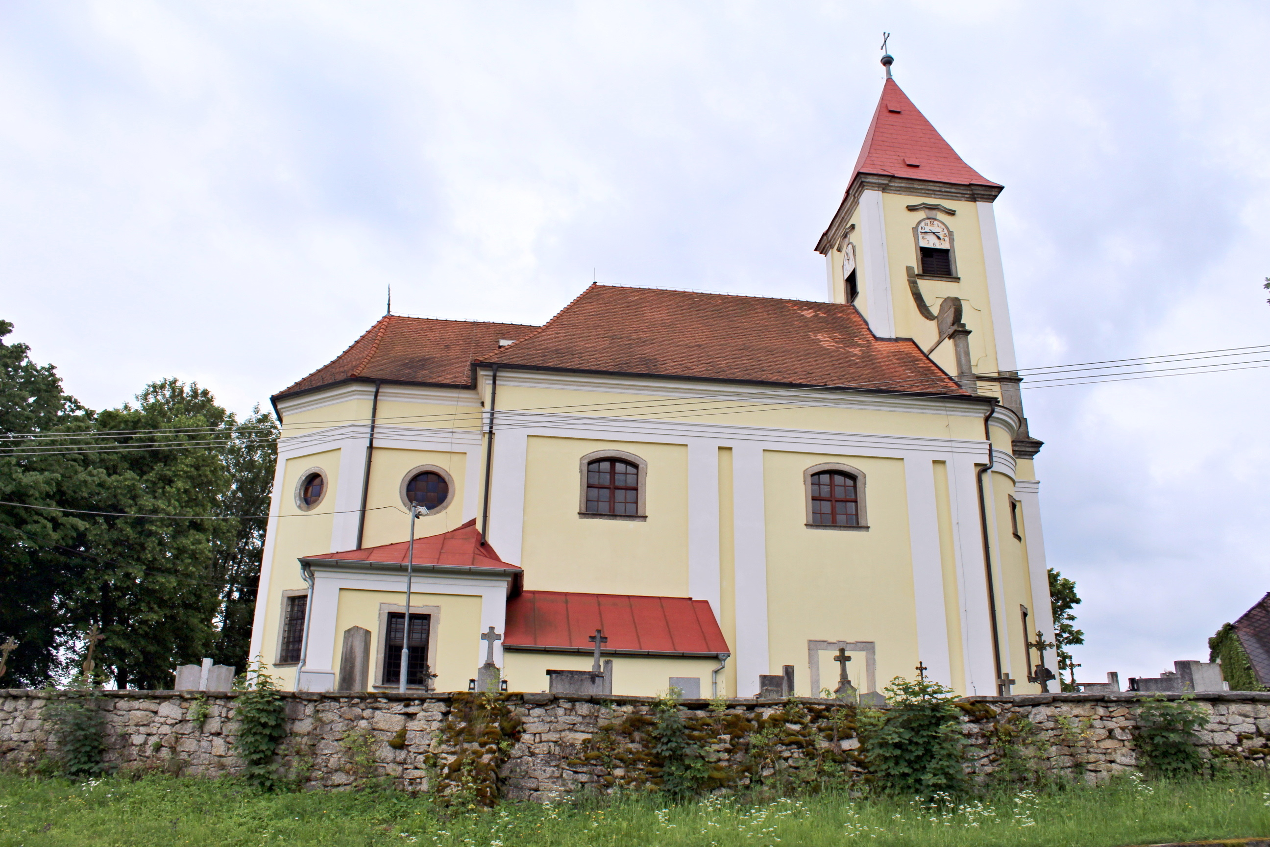 Kostel svatých Oldřicha Augsburského a Linharta